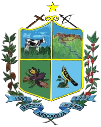 Escudo del municipio Aricagua. Estado Mérida. Venezuela